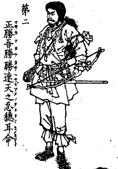 音川安親編 万物雛形画譜 天忍穗耳尊